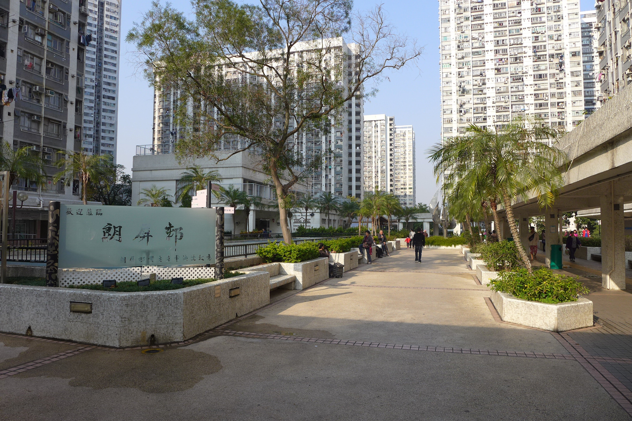 Long Ping Estate Podium